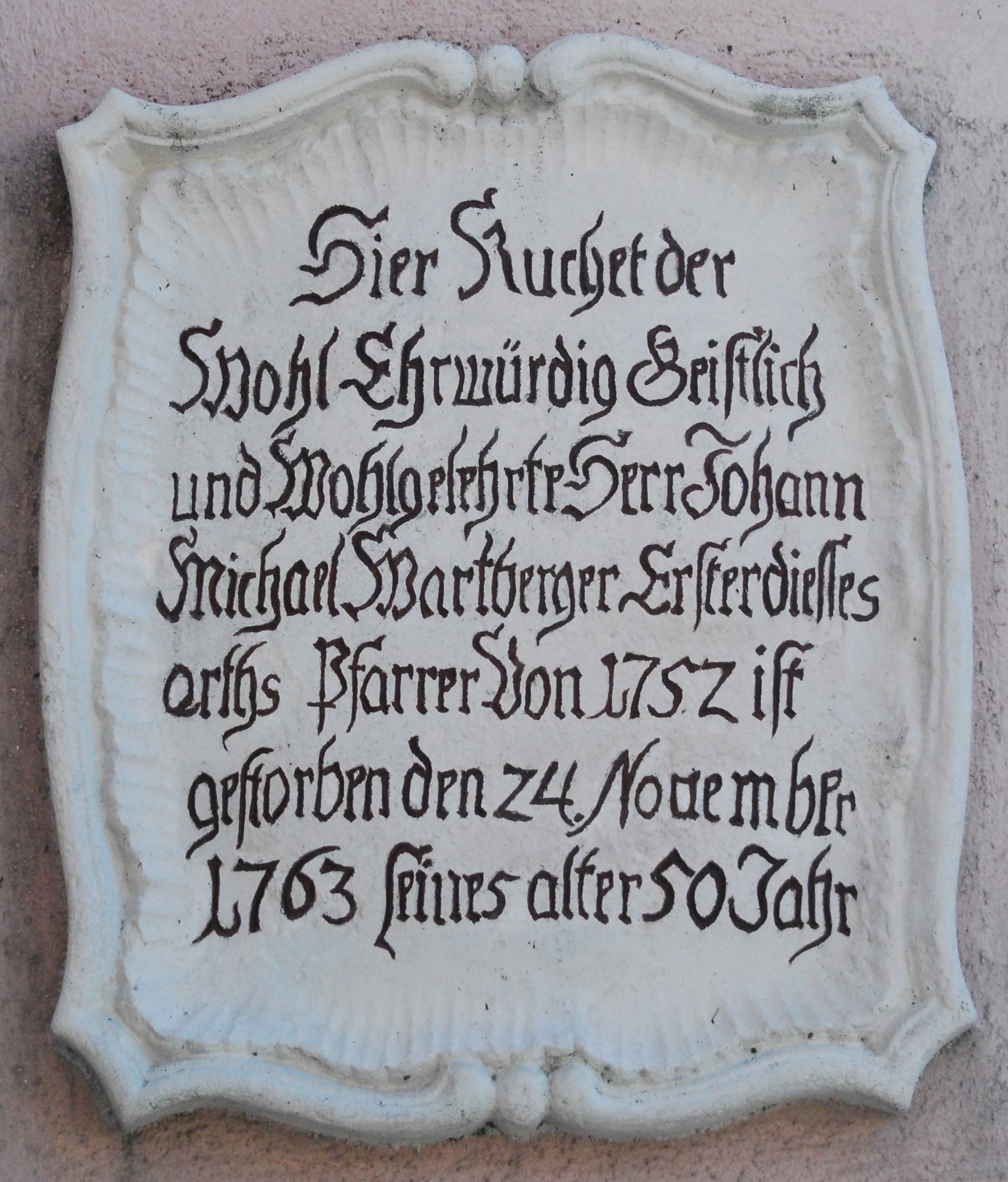 Denkmalgeschützte Tafel an der Pfarrkirche von Felling (Stadtgemeinde Hardegg) in Niederösterreich.